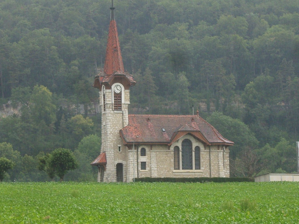 Vuitebœuf, église